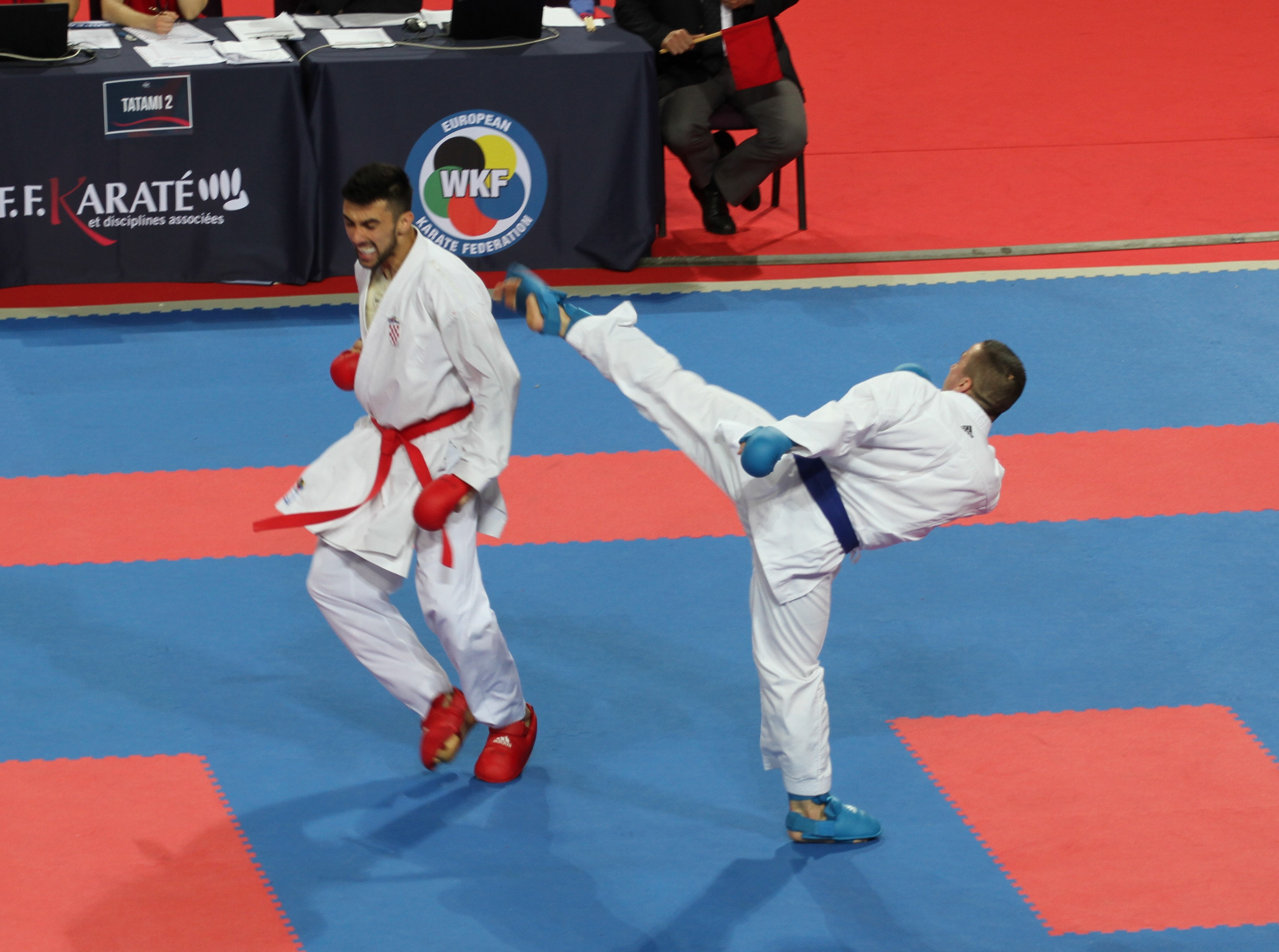 Ura-Mawashi-Geri im Kampf bei der Europameisterschaft 2016 in Montpellier